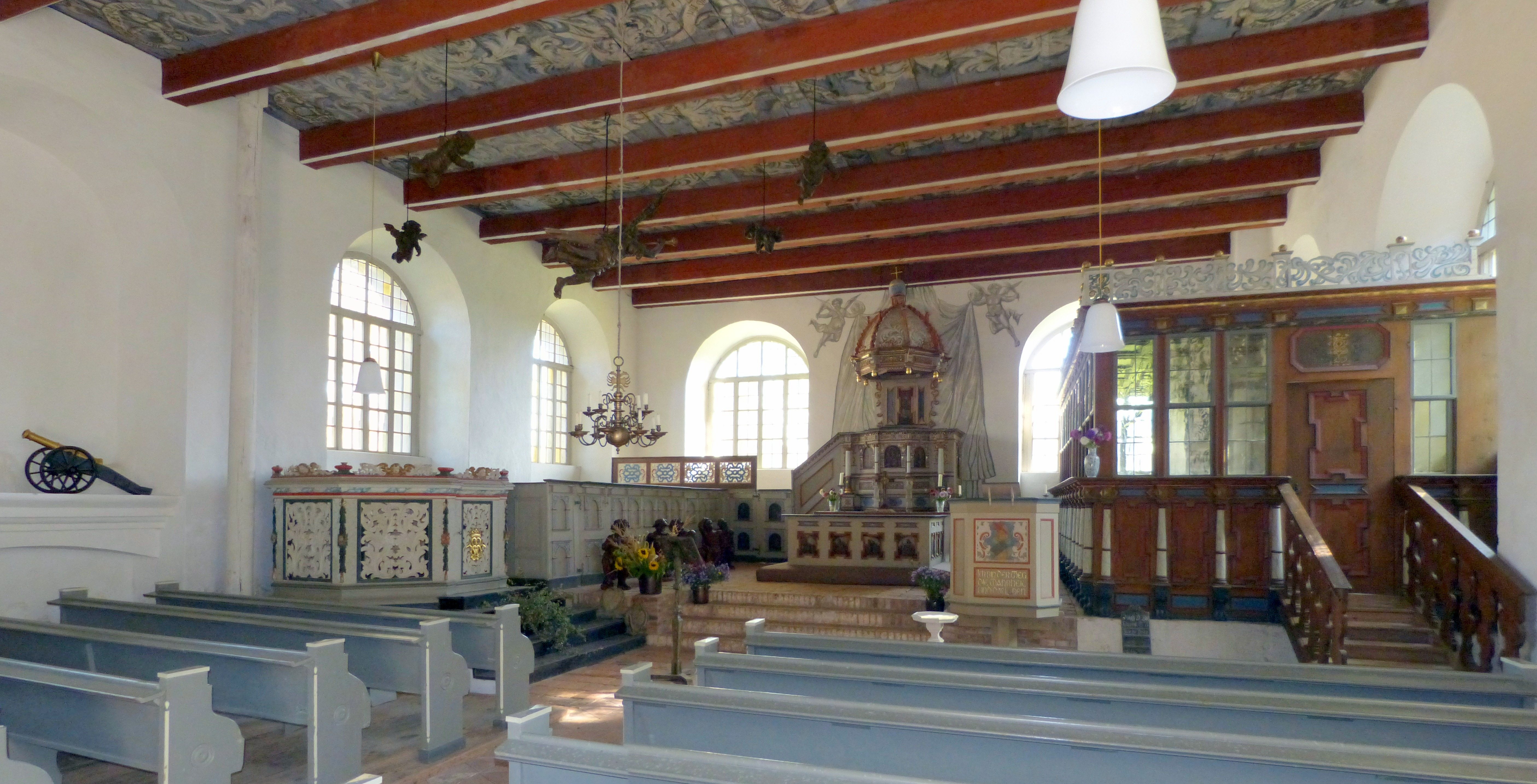 Kirche Putzar, Gesamtansicht des Altarraums mit Pfarrgestühl, Lesepult, Trauerfiguren, Kanzelaltar, Altartisch, Patronatsloge